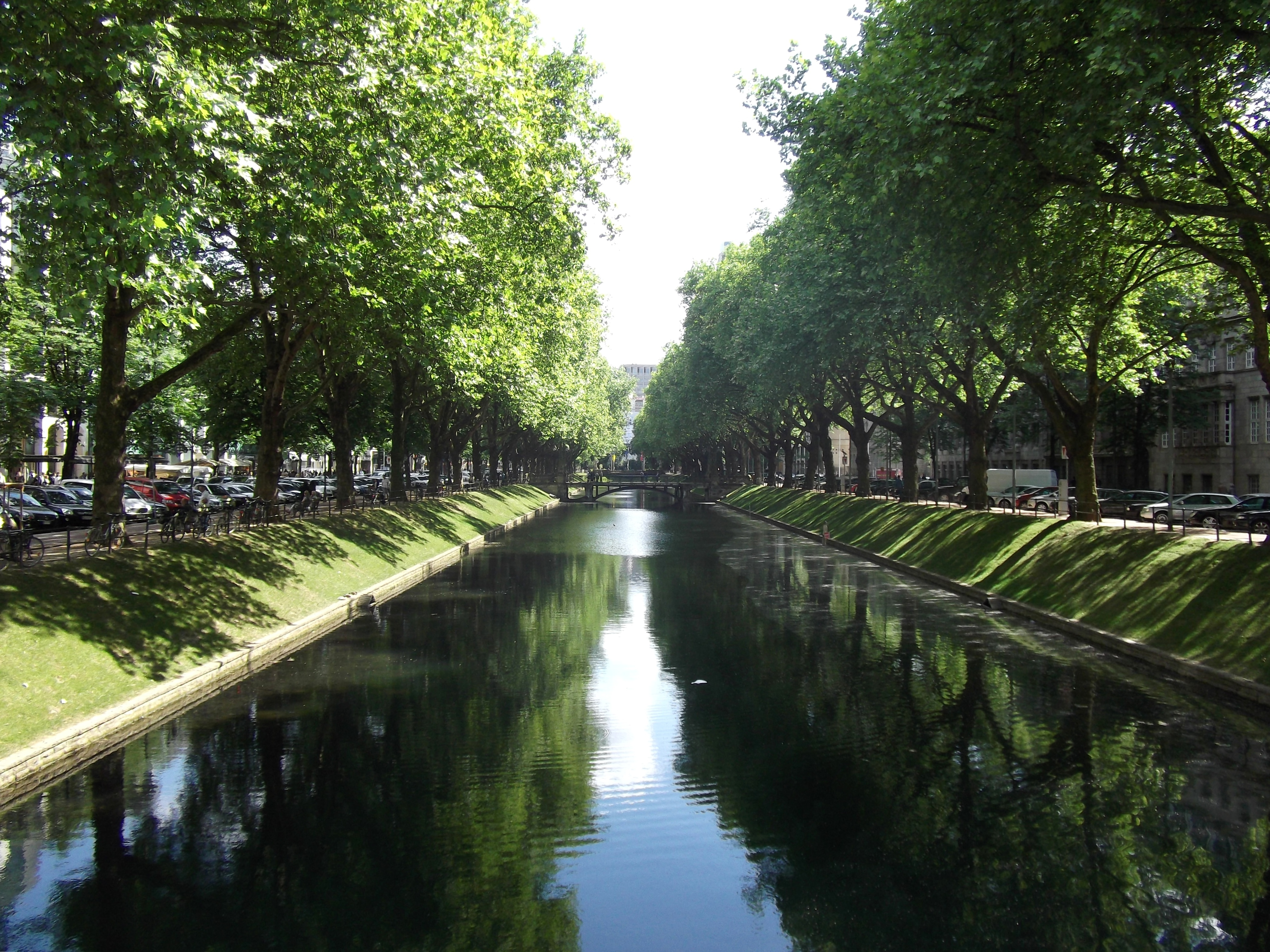 Düsseldorf, Germany: Königsallee